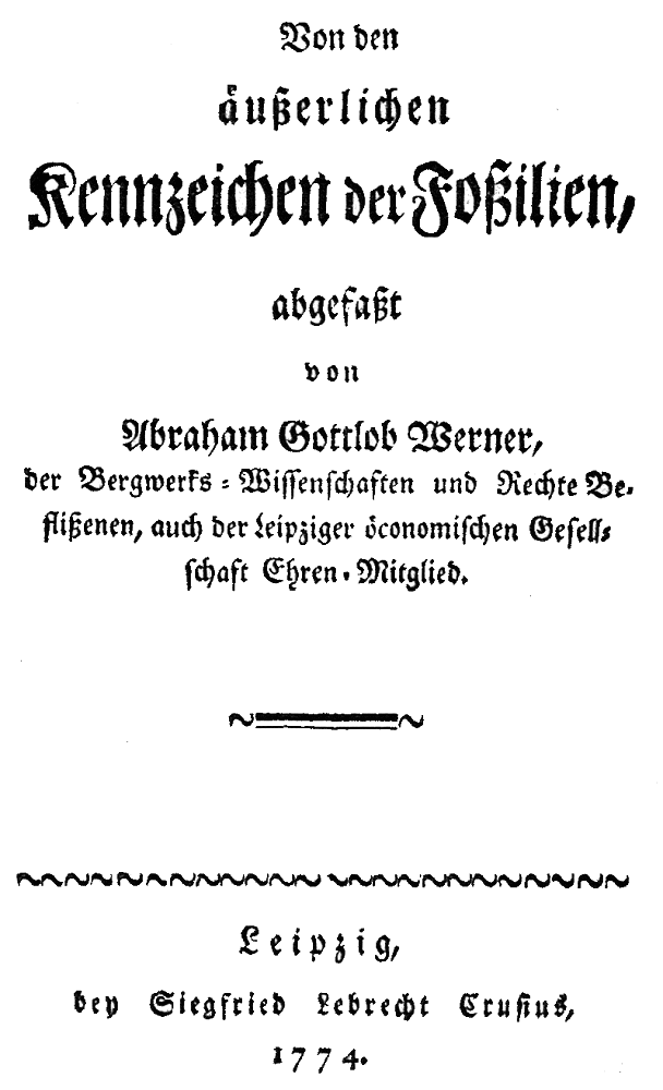 Титульный лист книги «О внешних признаках ископаемых тел»: Werner A.G. Von den äusserlichen Kennzeichen der Fossilien. Leipzig: S.L. Crusius, 1774. 304 S.